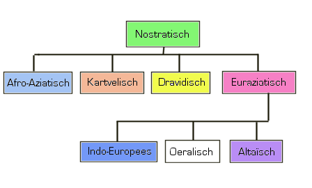 Overzicht van de nostratische taalfamilie. Eigen werk. Arvey 07:32, 12 May 2005 (UTC)